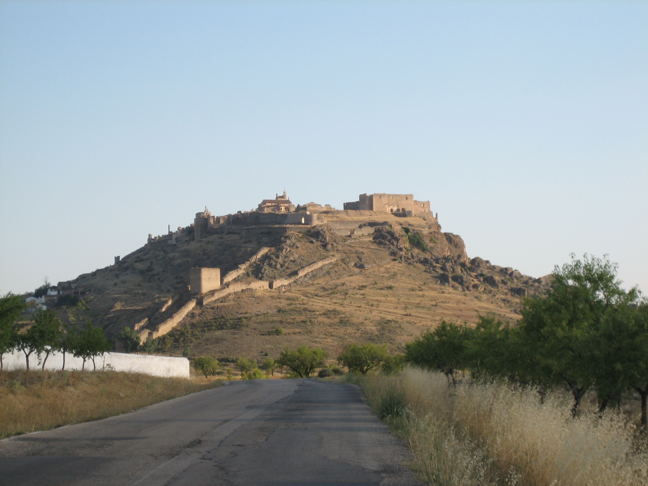 Vista del castillo de Molla desde la carretera de Santo Domingo de Moya